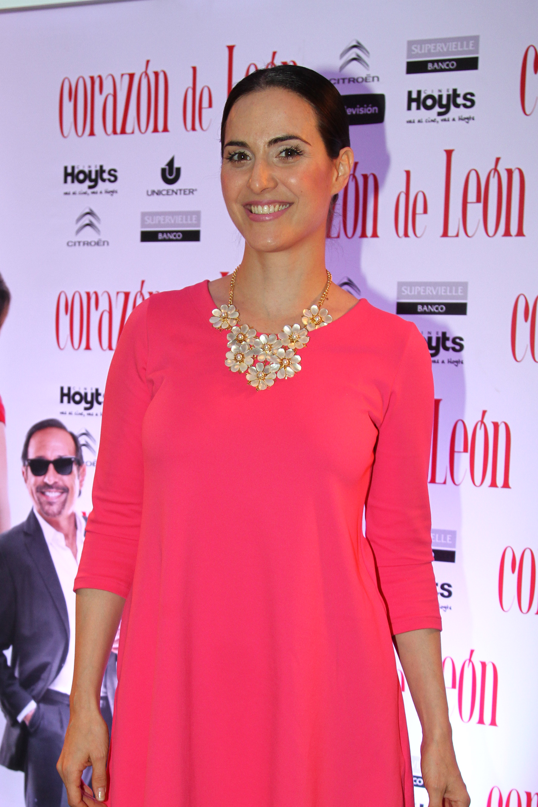 Julieta Díaz en la presentación de la película "Corazón de León". Fotógrafo: Maxi Casalia Tomada con una Canon EOS 7D el día 12 de agosto, 2013.